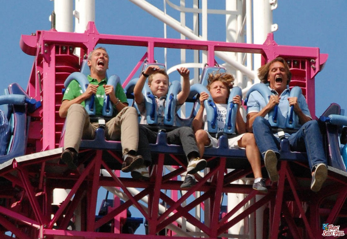 40 Métre de chute libre au Parc Saint Paul